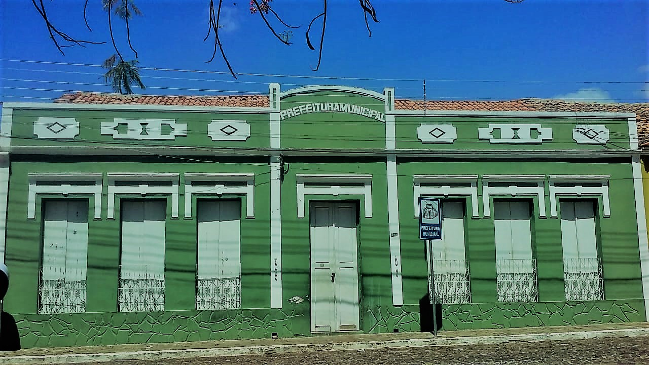 Palacete Cidade Imperial, a prefeitura de Pedro II (Piauí).